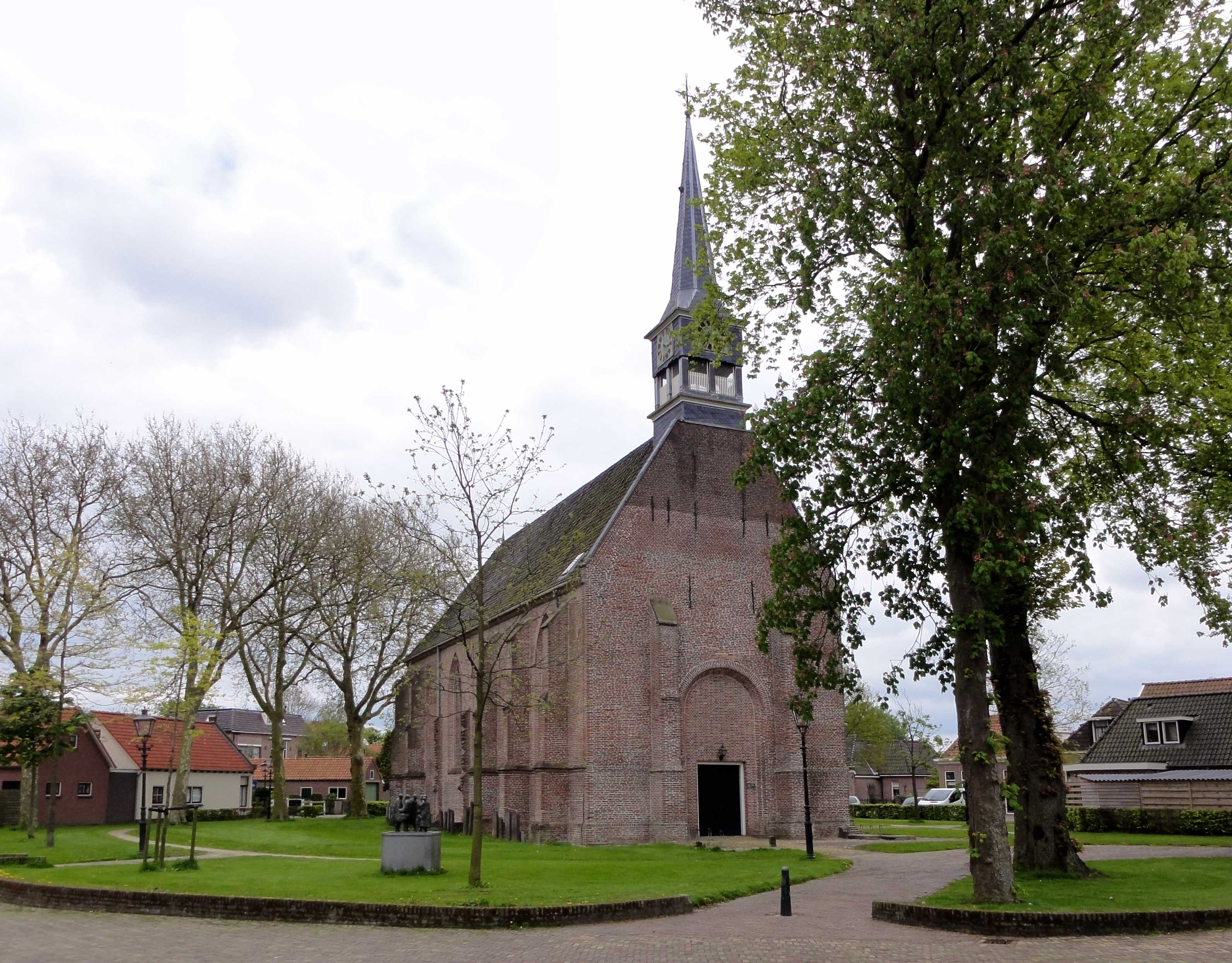 Hervormde kerk aan het Marktplein 7 in Oldemarkt (rijksmonument)